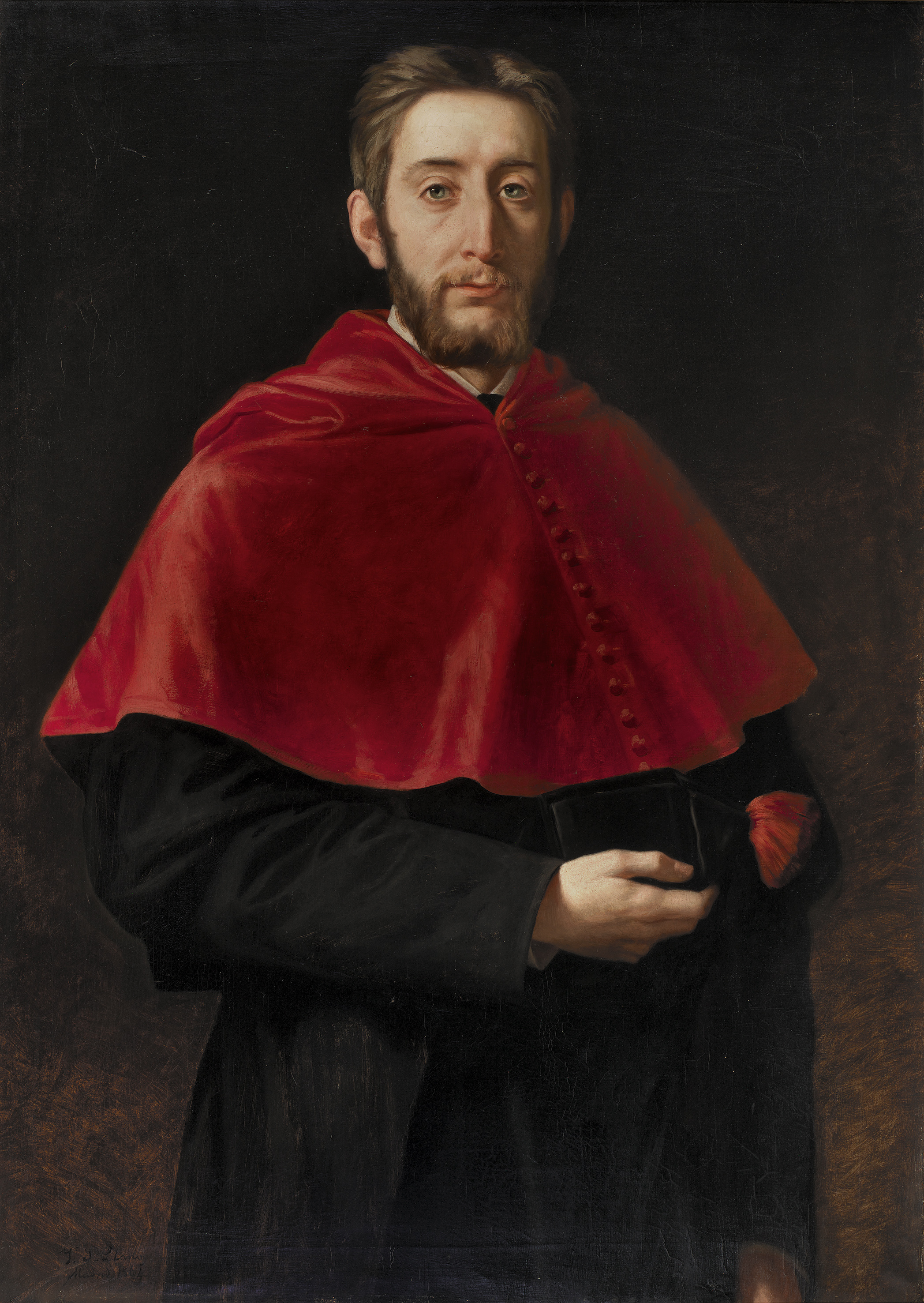 Retrato del pintor español Enrique Mélida (1838-1892).